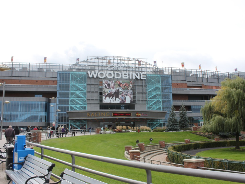 ウンドバイン競馬場2013年10月27日